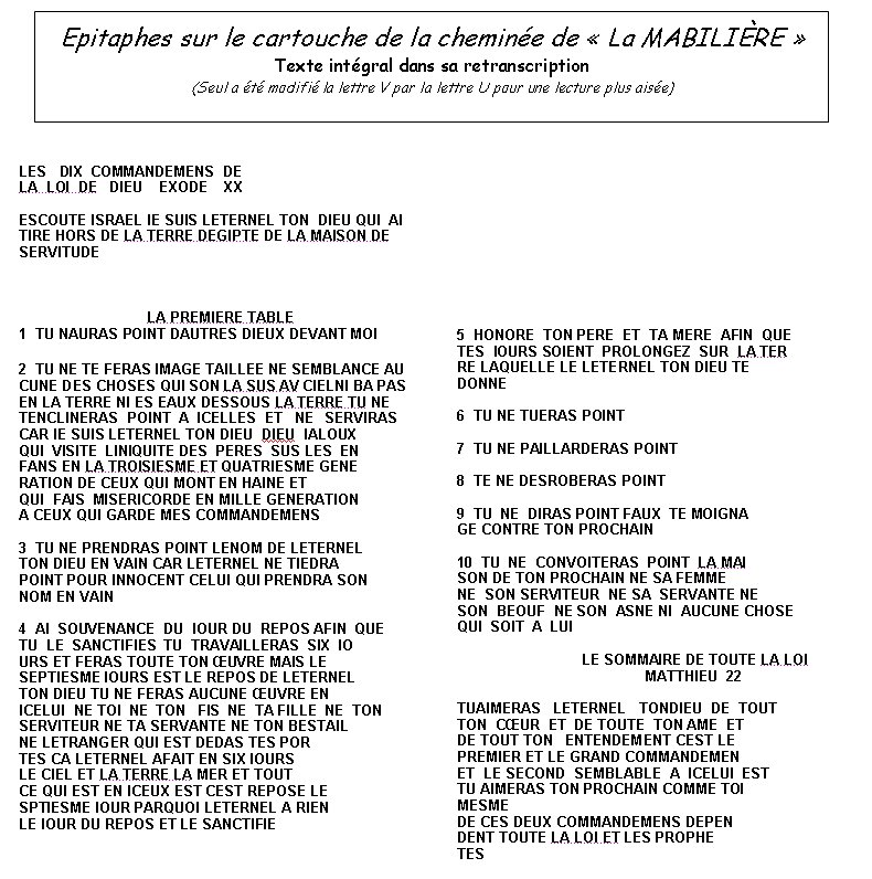 Photo de la retranscription du décalogue de "La Mabilière"